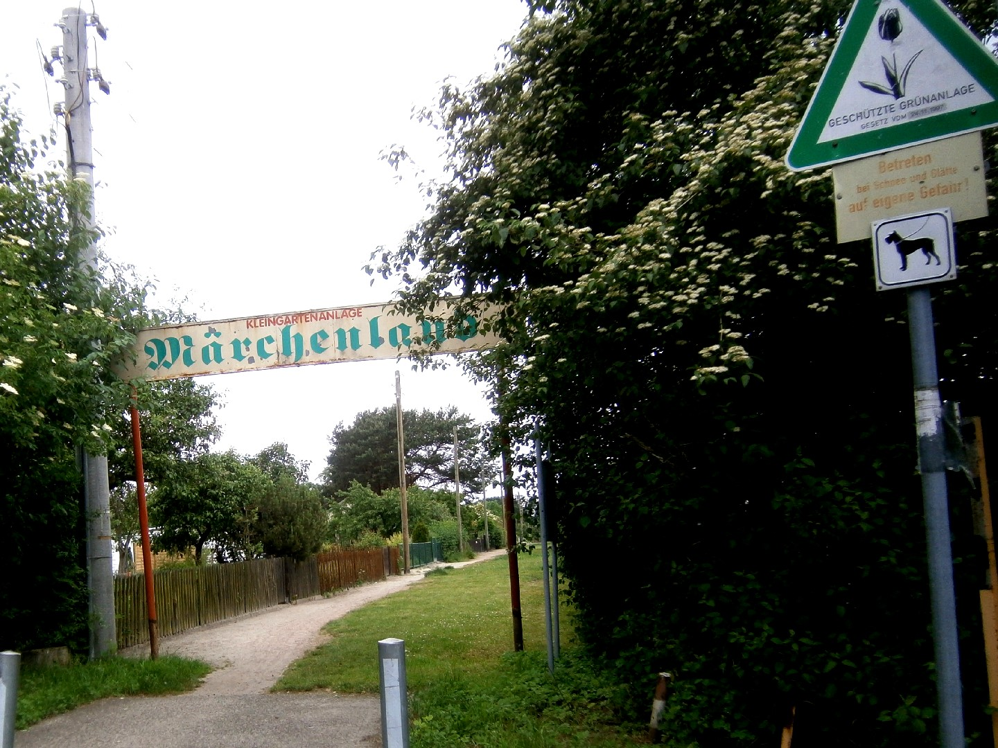 Die Anlage Märchenland ist eine Kleingartenkolonie mit dem Status Naherholungsgebiet im Berliner Ortsteil Stadtrandsiedlung Malchow im Bezirk Pankow.